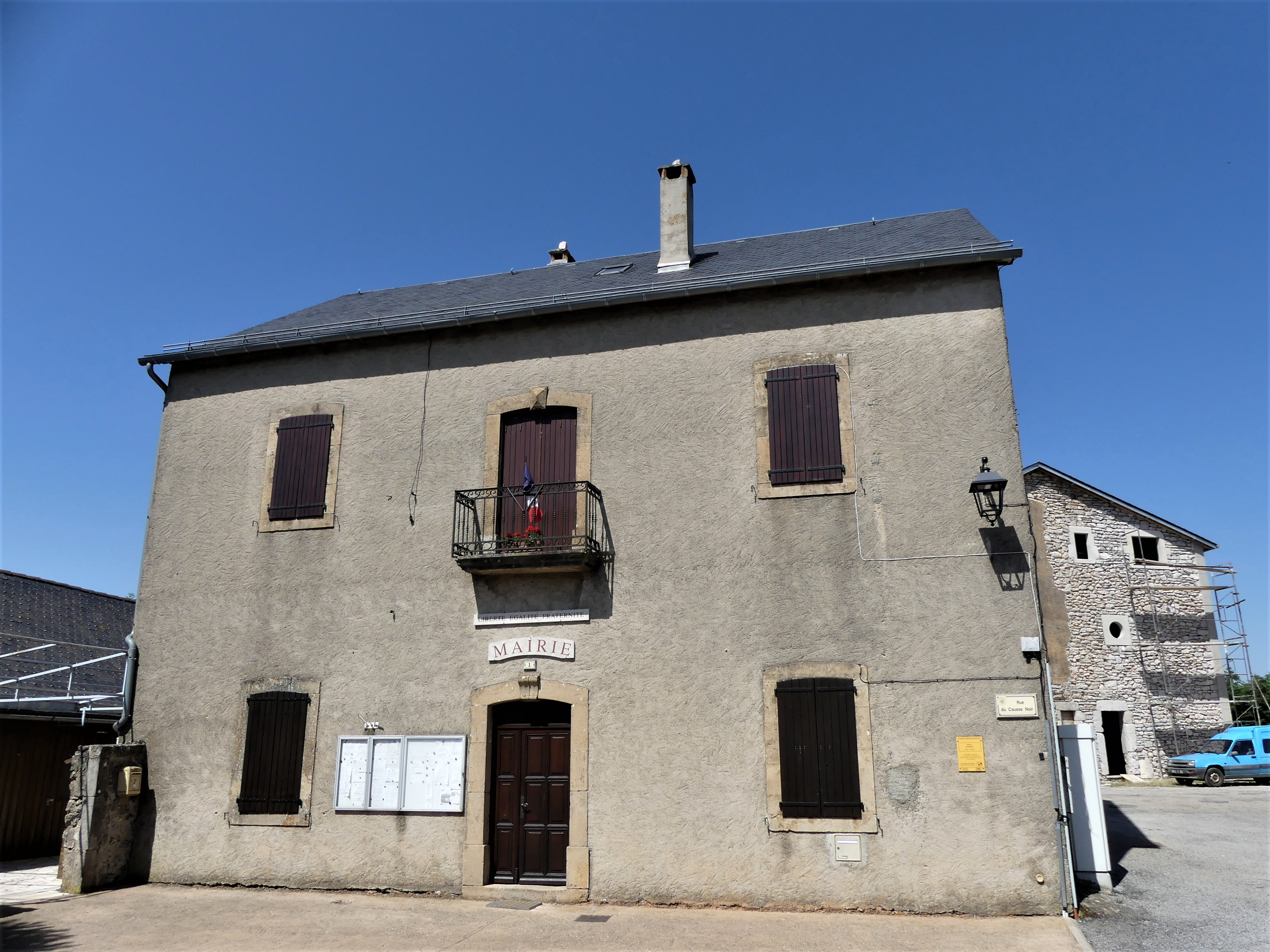 La mairie de Revens, Gard, France.